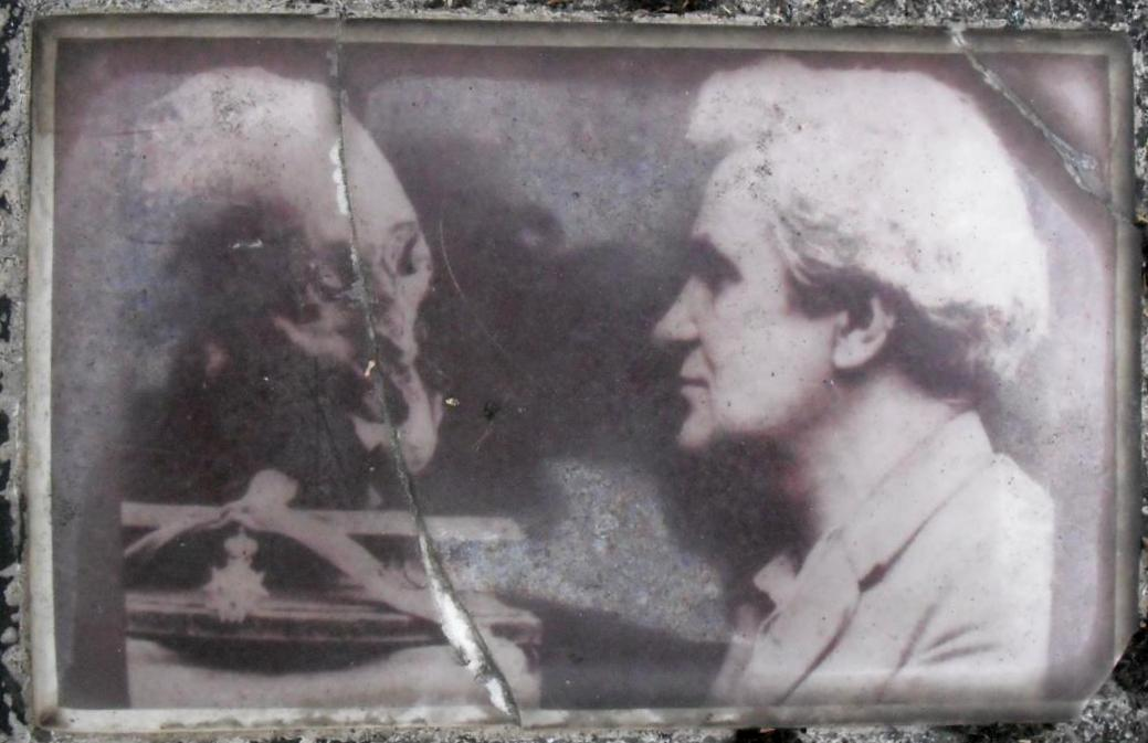 Plaque émaillée sur la tombe de Joseph-Emile Bourdais (1881-1946), cimetière parisien de Pantin (Seine-Saint-Denis, France)